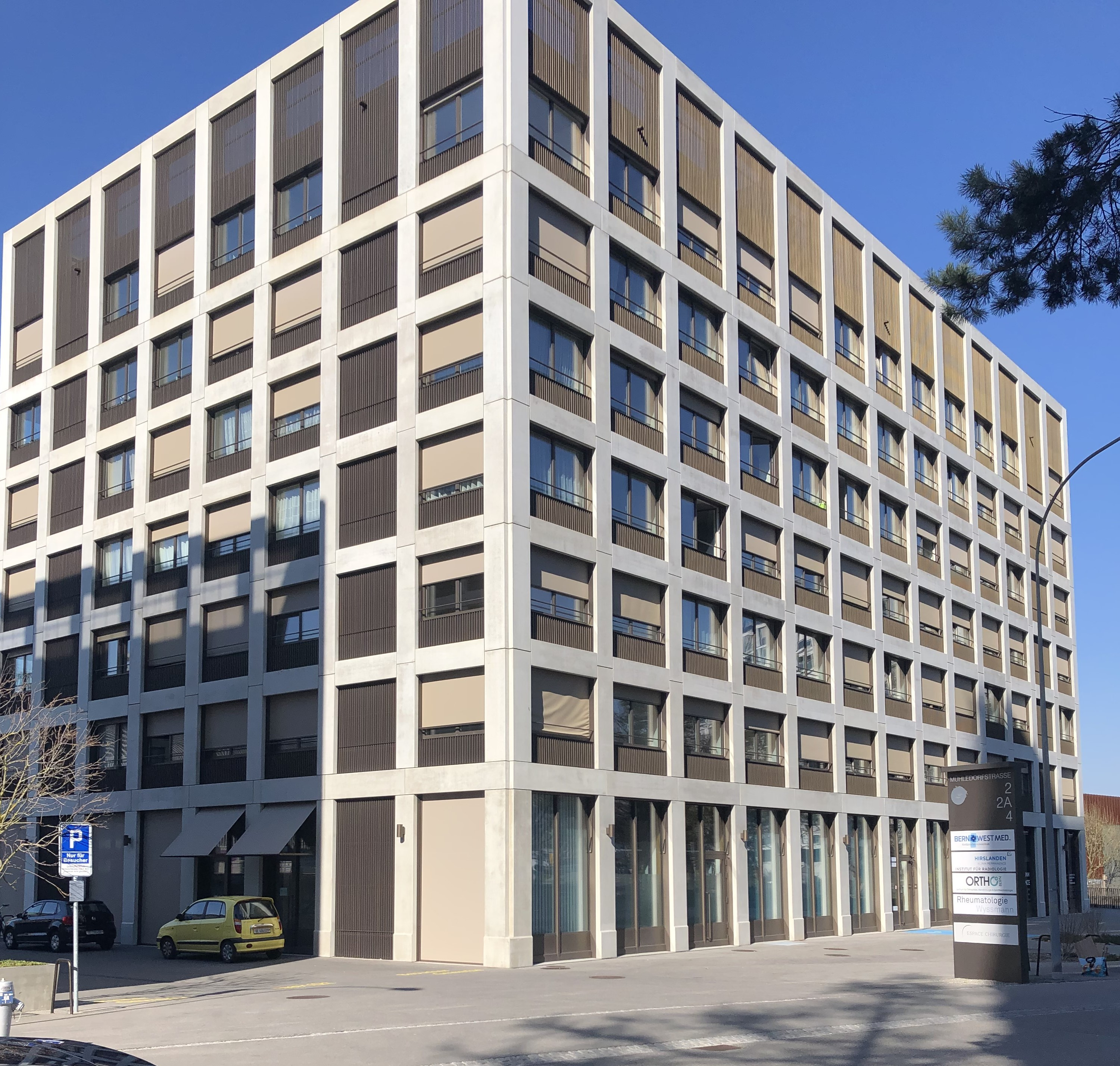 Fellergut Bebauung Industriegebäude